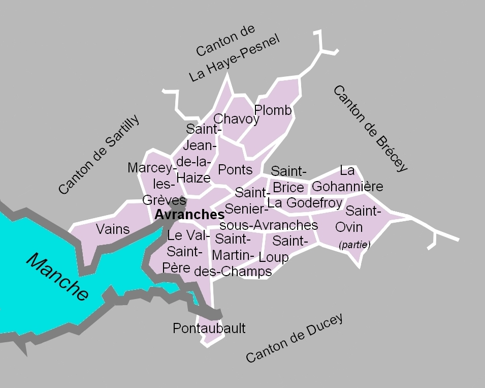 Carte du canton d'Avranches en 2012.